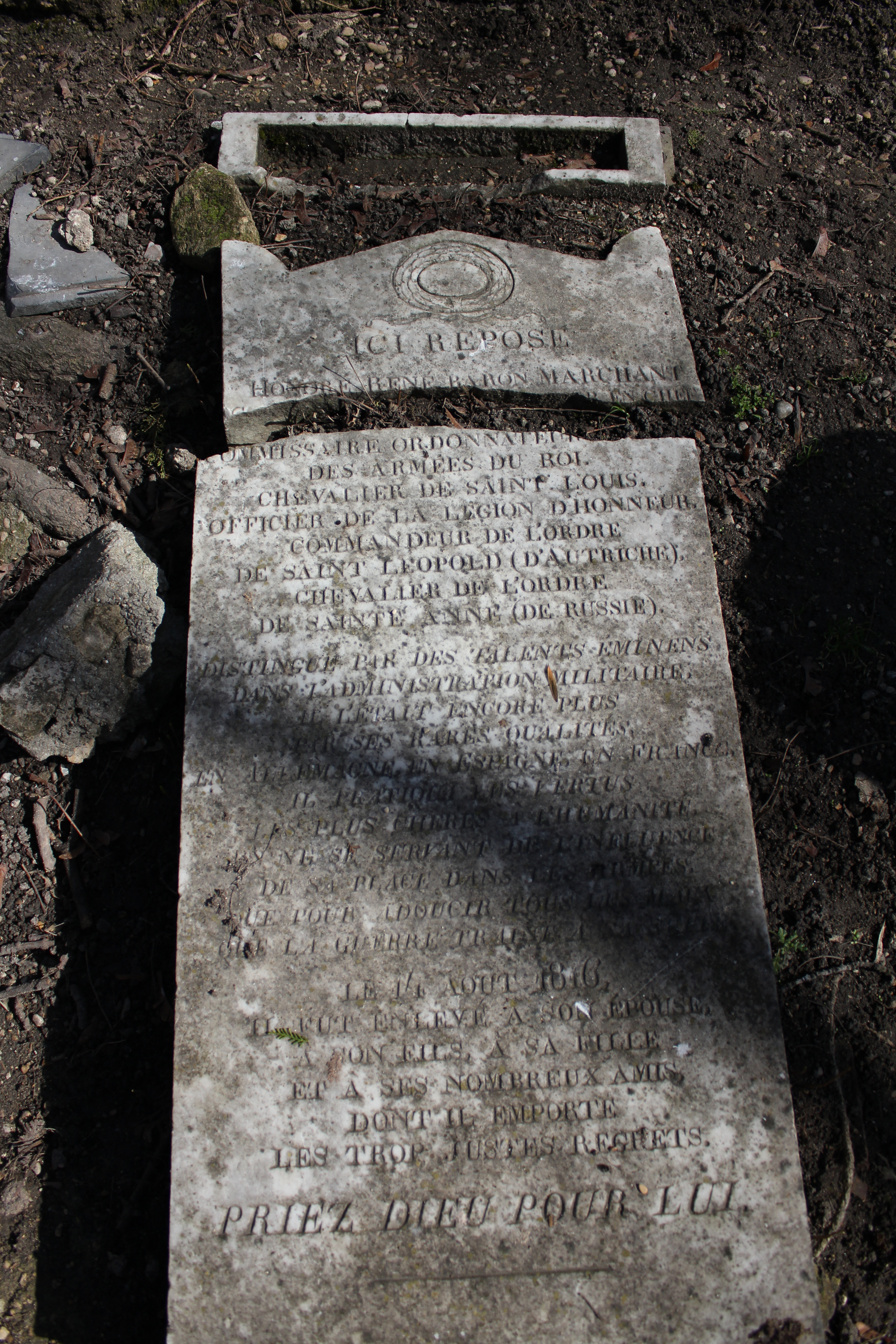 Stèle couchée et brisée. vue générale